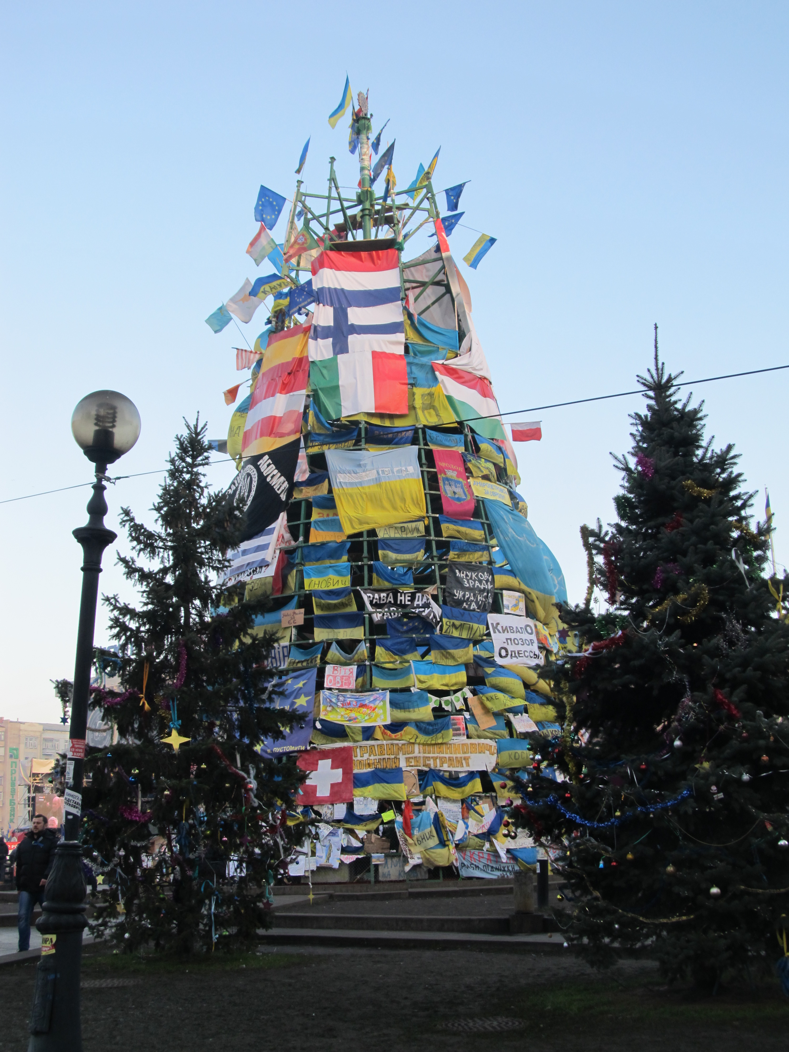 Євромайдан у Києві